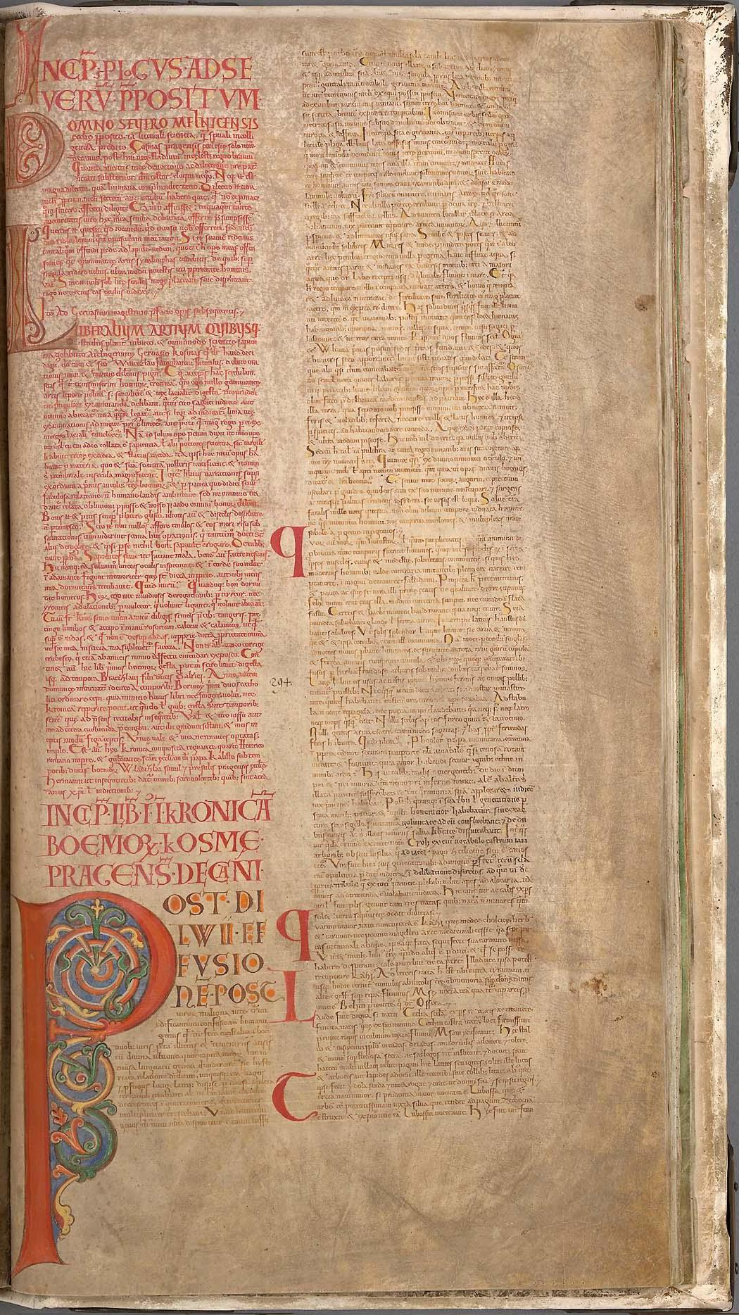 Первая страницы Чешской хроники